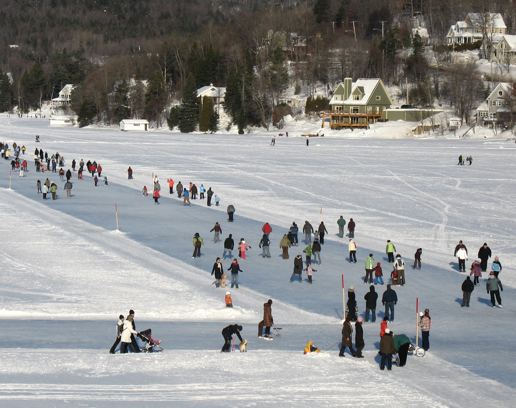 Patinoire et promenade sur le lac Beauport gelé. Capitale-Nationale, Province de Québec, Canada